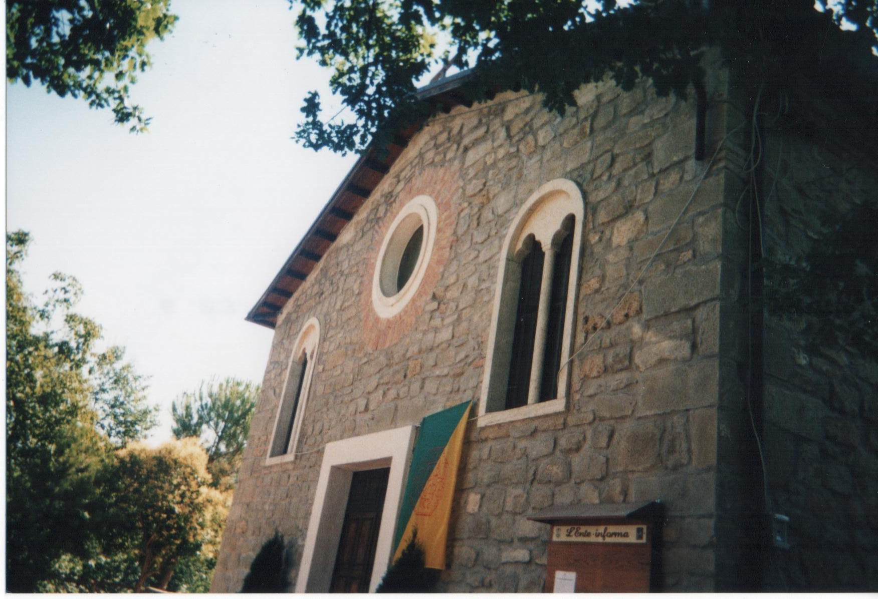 facciata della chiesa dei SS. Proto e Giacinto, con bandiera dell'antica repubblica, Senarica (Teramo)